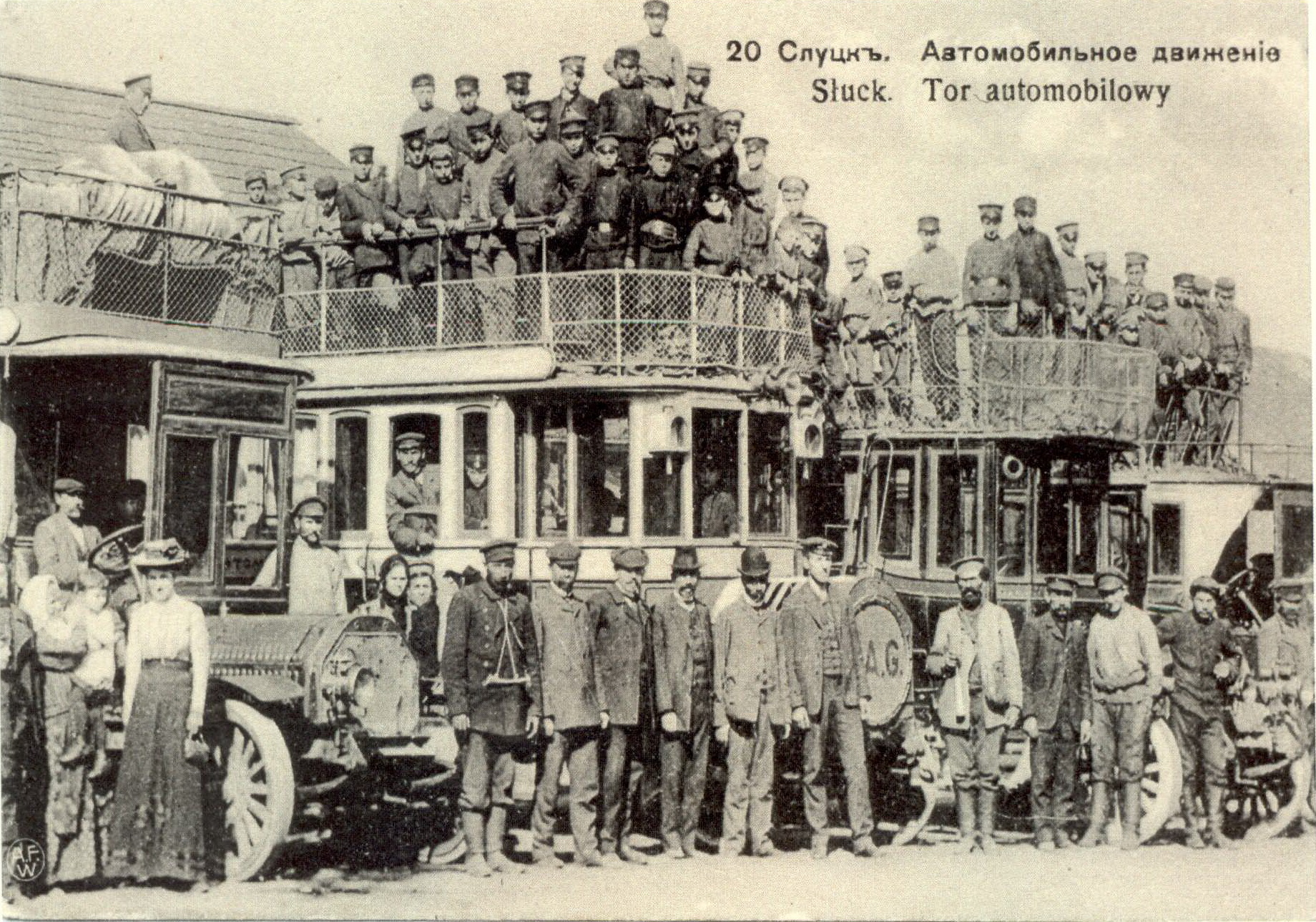 be:Слуцкі краязнаўчы музей паштоўка "Слуцкъ. Автомобильное движение" Аўтары: Юхнін Самір Л.; Матэрыялы: папера; Тэхналогіі стварэння: друк; Дата стварэння: 1920-я гг. Месца стварэння: БССР, г. Слуцк Памеры: 9 х 13,5Беларуская (тарашкевіца): Слуцак. Аўтобусы N.A.G.